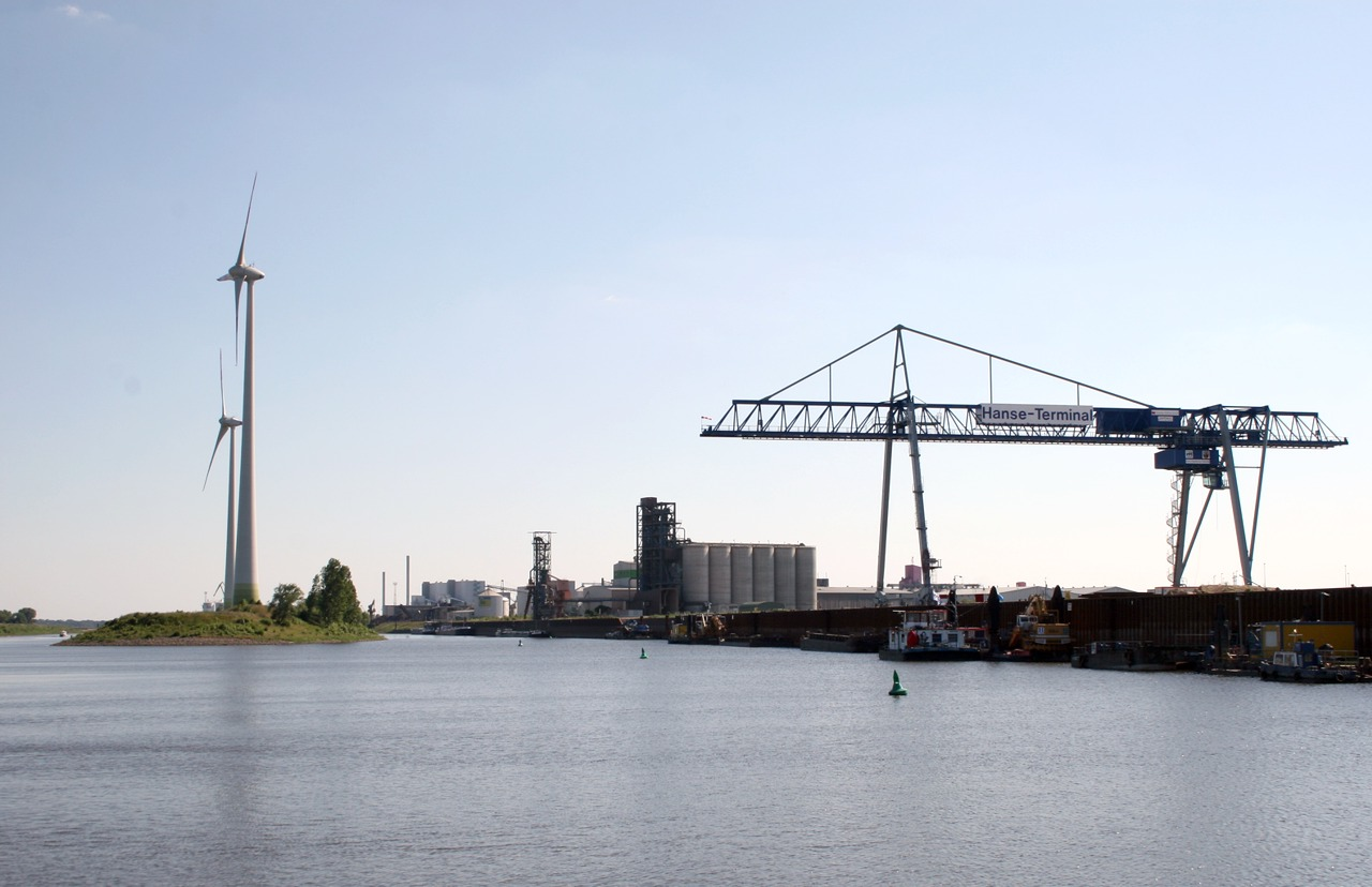 Einfahrt in den Hansehafen und Kanalhafen von Magdeburg.